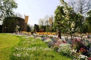 Français